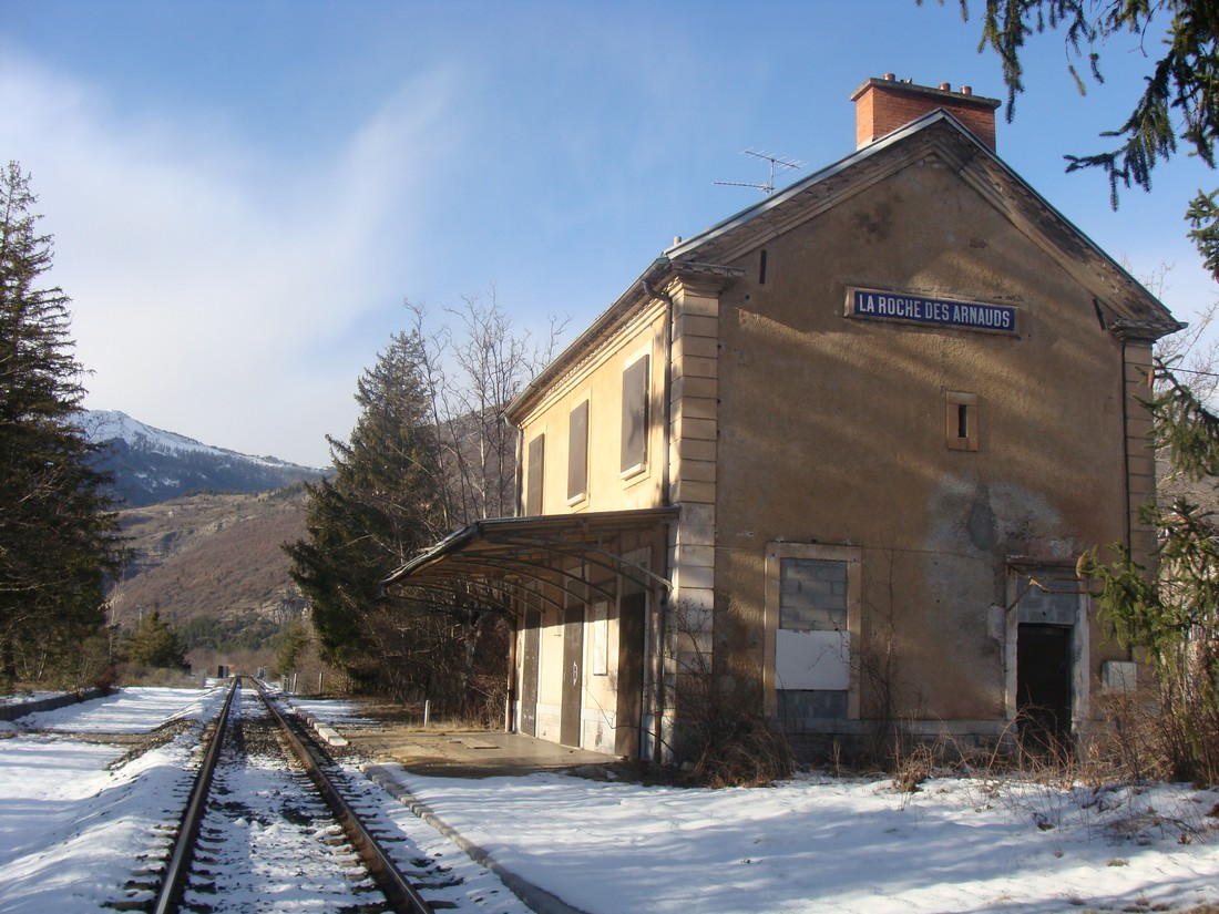 La voie de la ligne Veynes - Gap en gare de La Roche-des-Arnauds, vue en direction de Veynes.